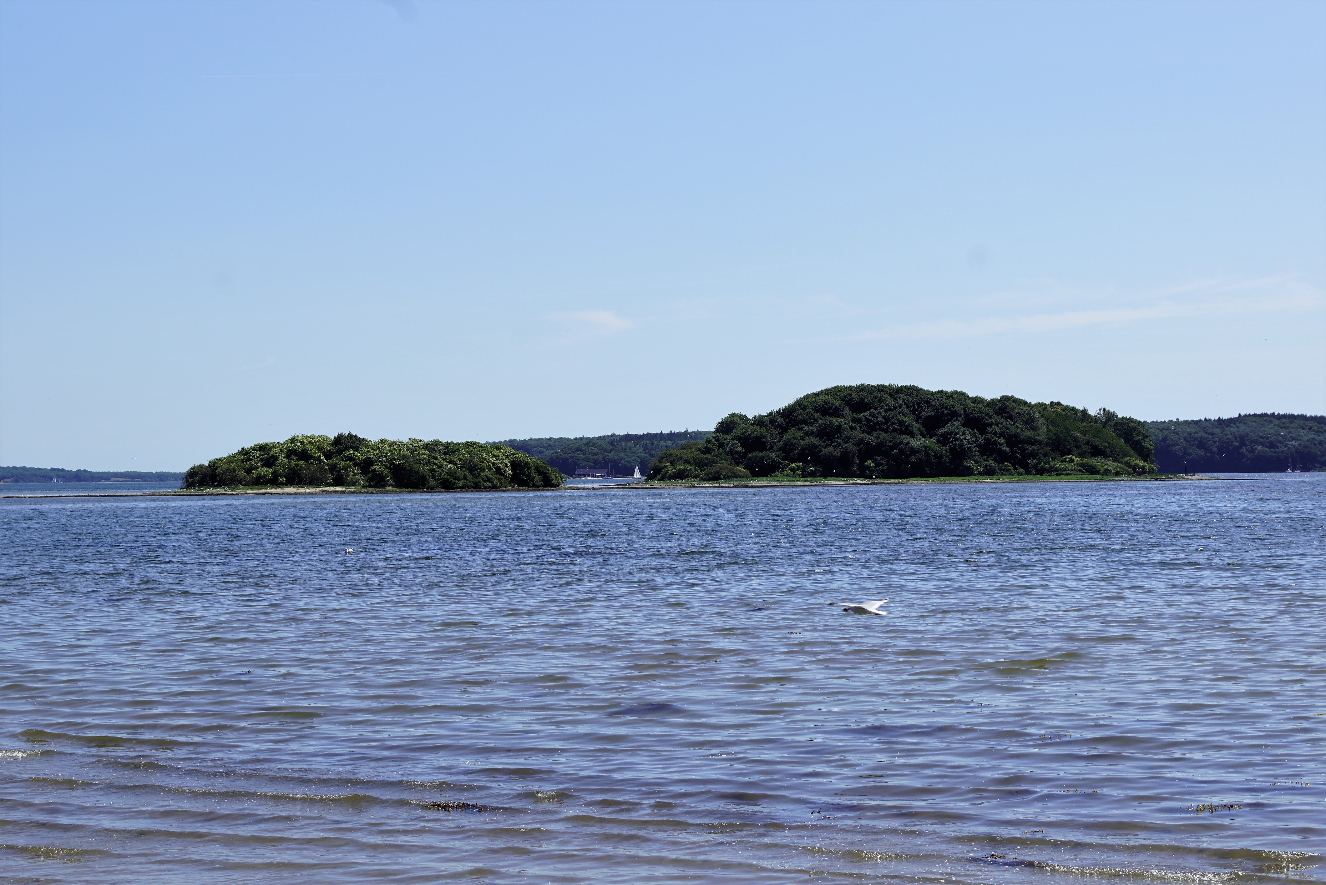 Kidholme i Gudsø Vig